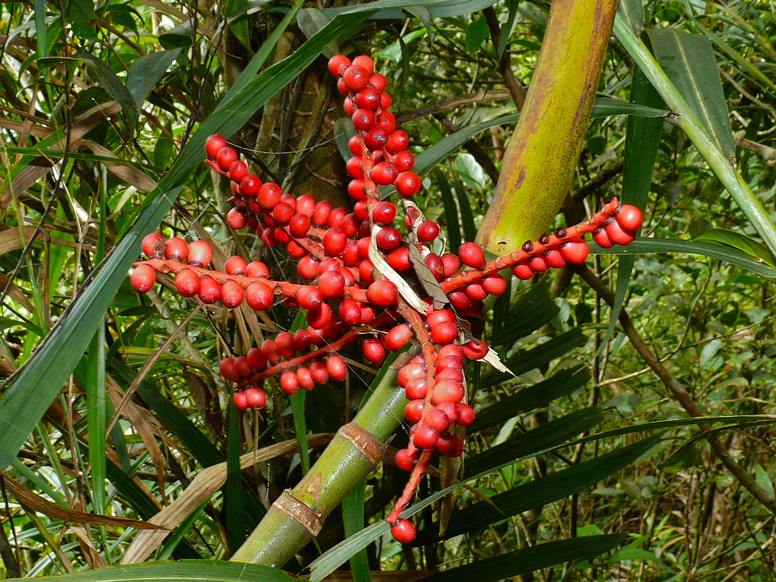 Mount Kinabalu NP, Sabah, MALAYSIA